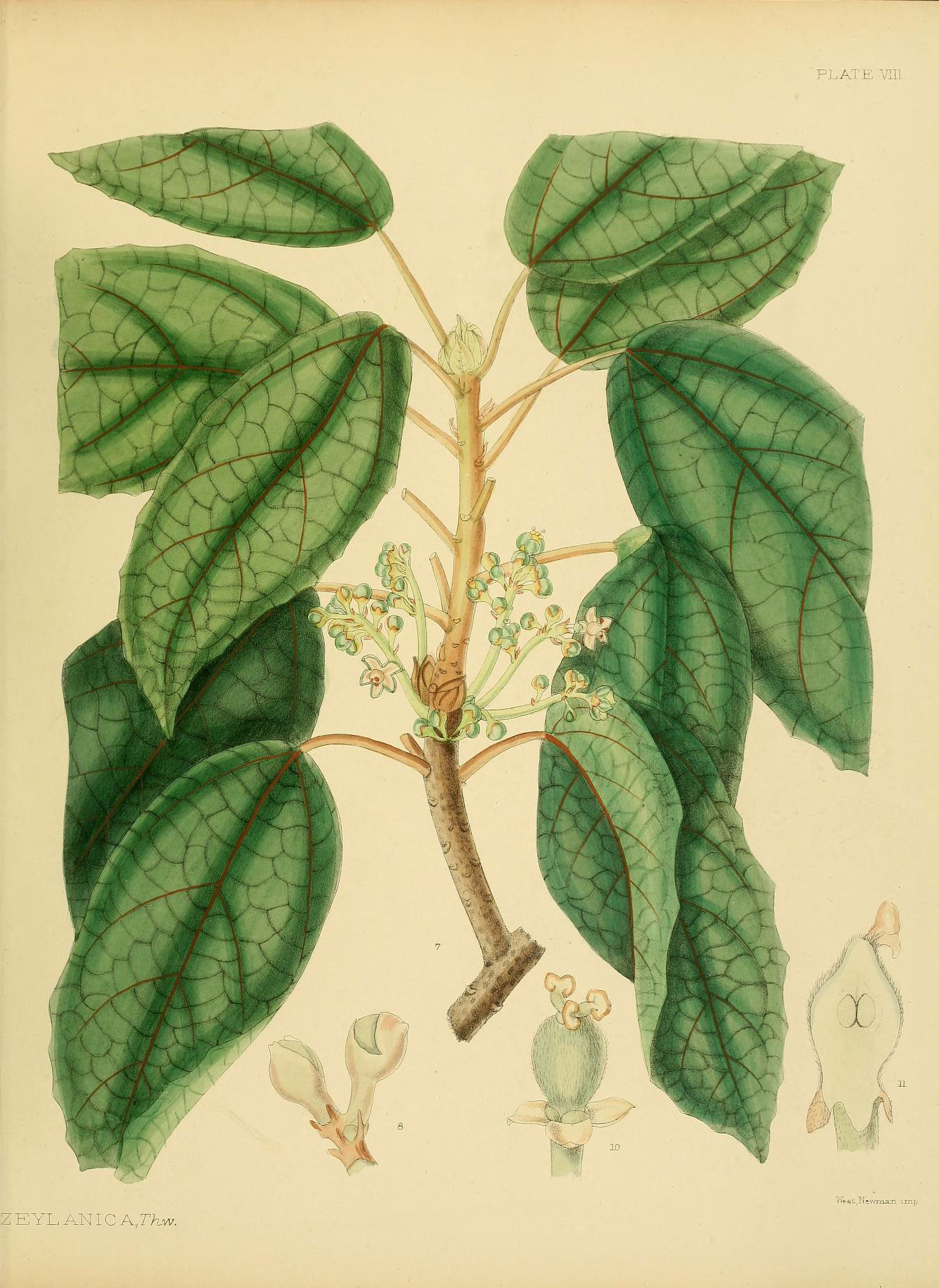 PLATE VIII ZEYLANICAAw. West !i .iicwmazi imp